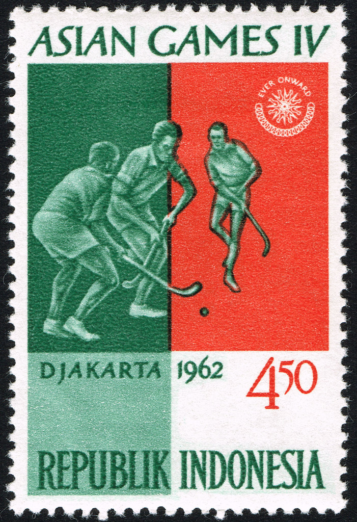 Asian Games IV